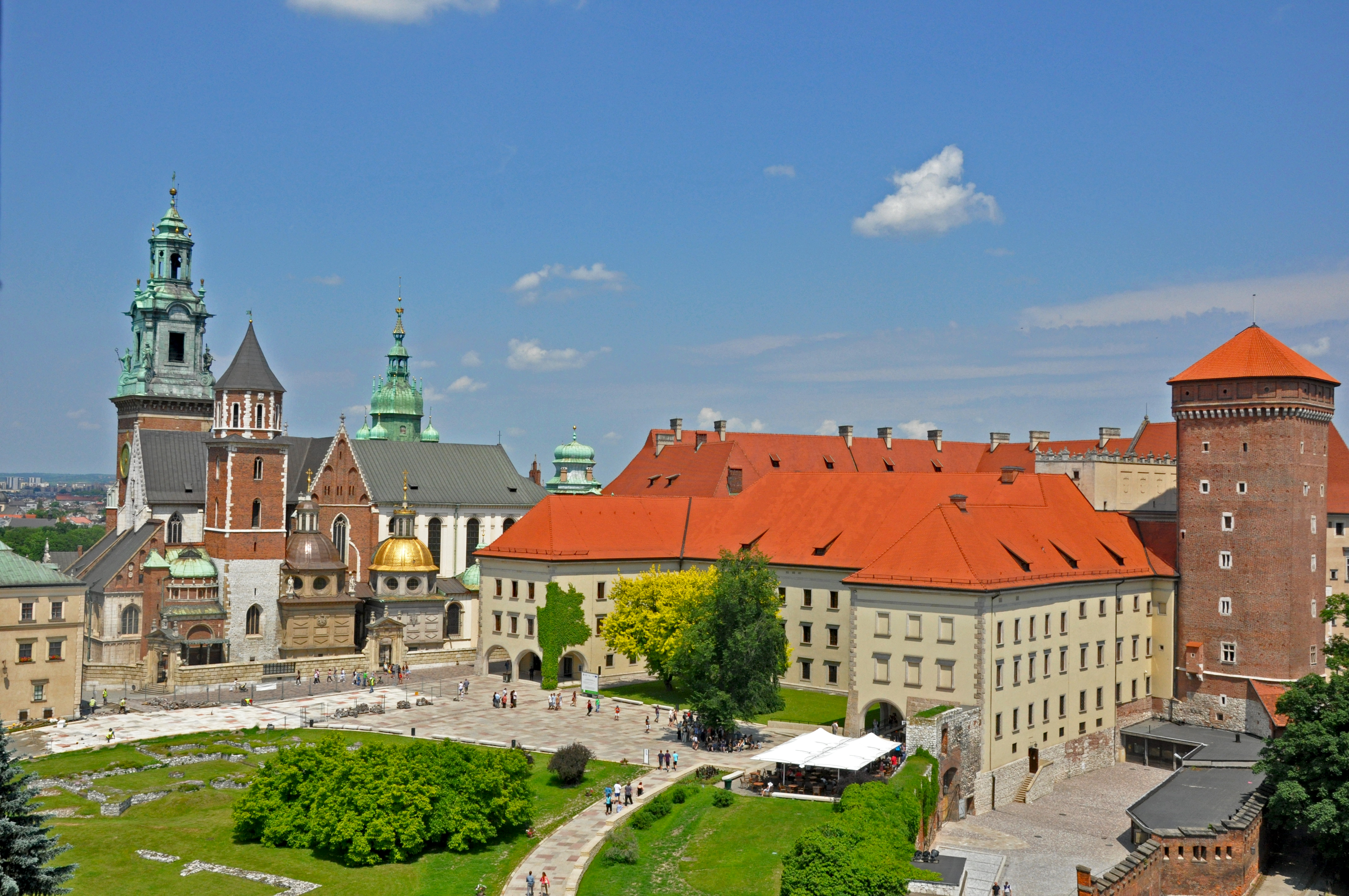 Wawel - widok z Baszty Sandomierskiej